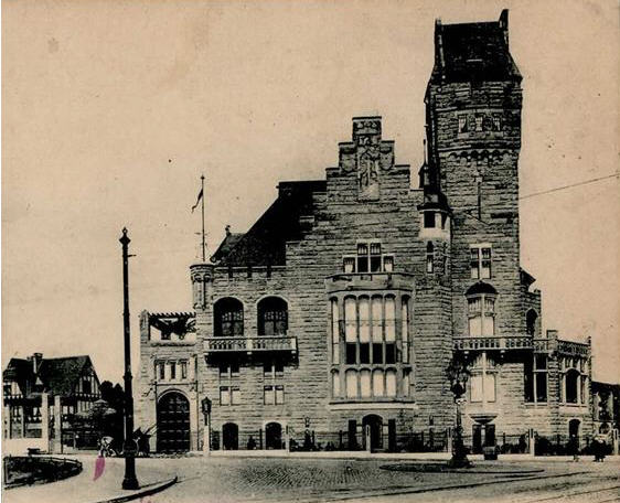 Villa Stollwerck in Köln-Marienburg, Ausschnitt aus einer Ansichtskarte